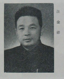 中文（台灣）: 中國人民政治協商會議第一屆全體會議代表